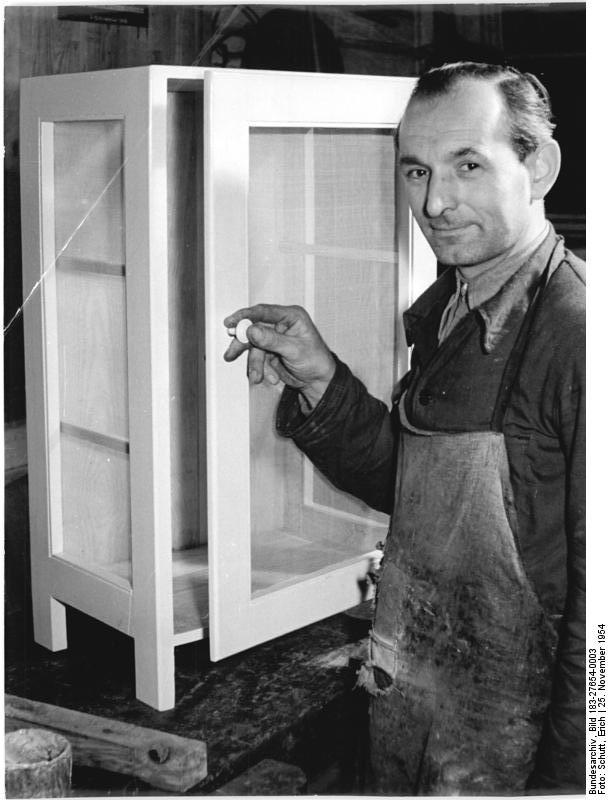 Welzow, Möbelfabrik, Gazeschränkchen Zentralbild Schutt 25.11.1954 Kampf um die Milliarde Geschmackvoll und praktisch sind die Gazeschränkchen die des "Alfred Scholz-Werk" Welzow aus Abfallmaterial seit einiger Zeit herstellt. Kollege Schötz mit einem der Gazeschränkchen, die zu 41, 40 DM in der HO-Industriewaren Spremberg zu kaufen sein werden.